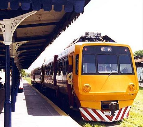 Tren suburbano del Ferrocarril Domingo Faustino Sarmiento en la estación de Lobos, provincia de Buenos Aires, Argentina.